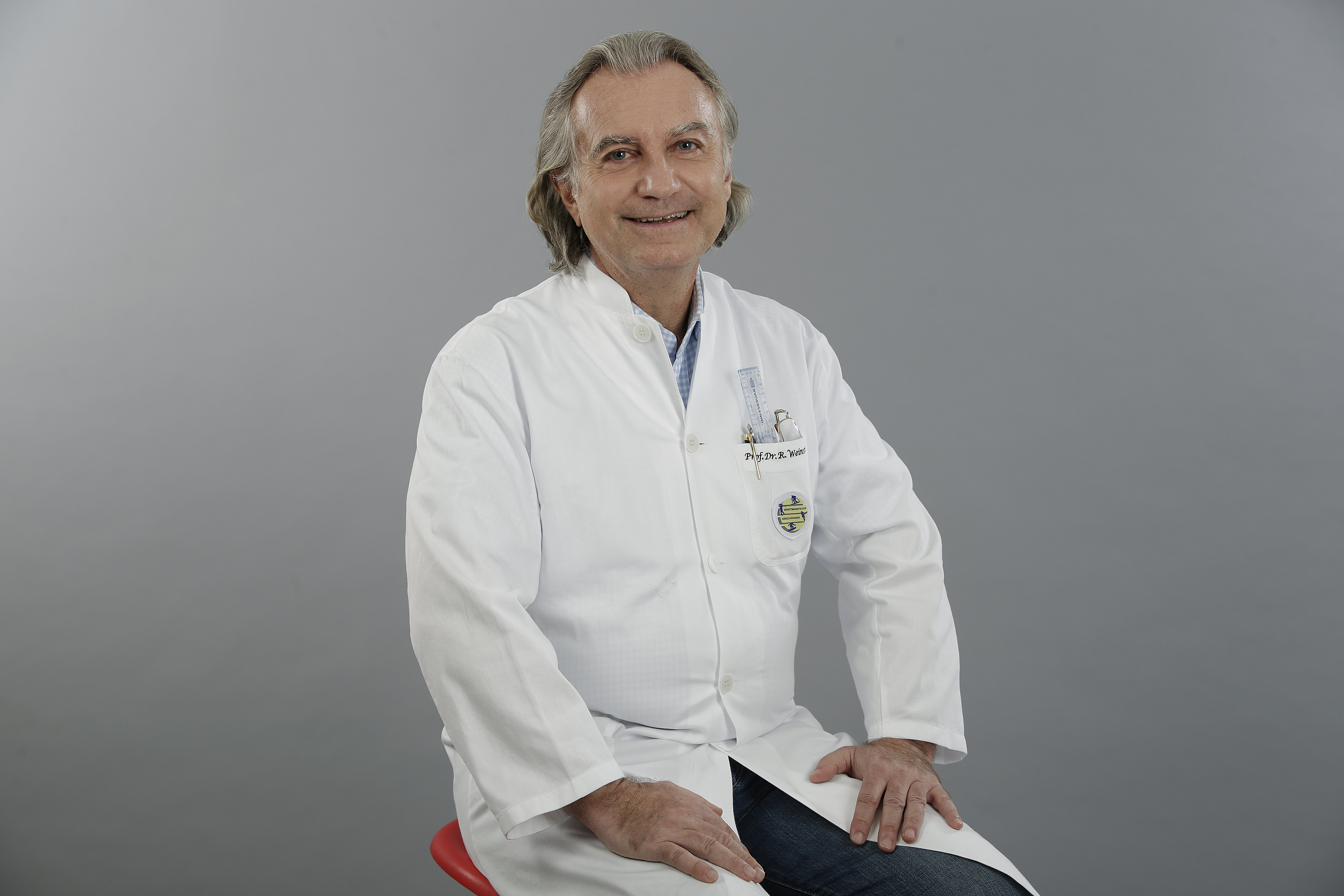 Foto: Uros Hocevar